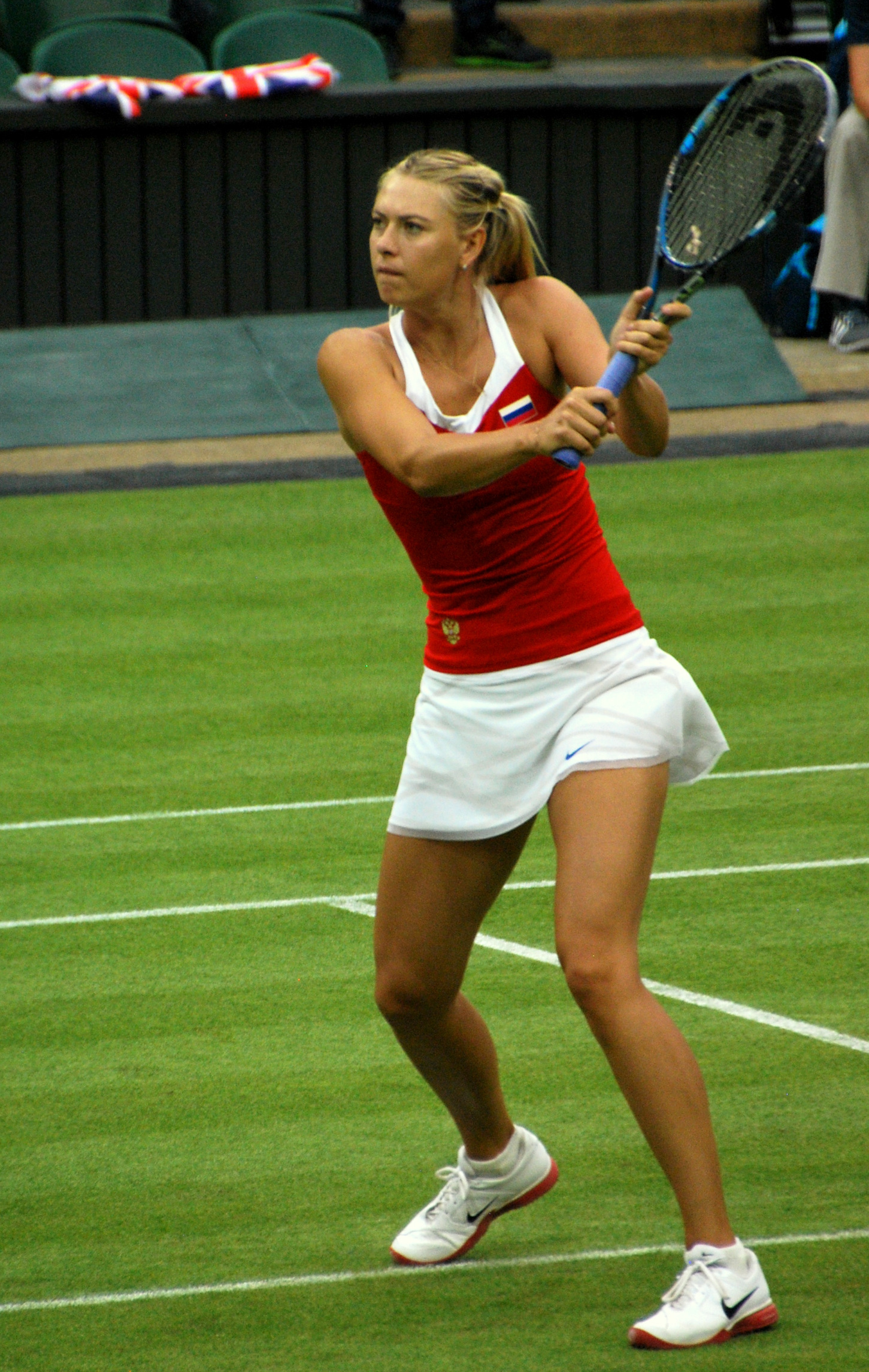 Maria Sharapova